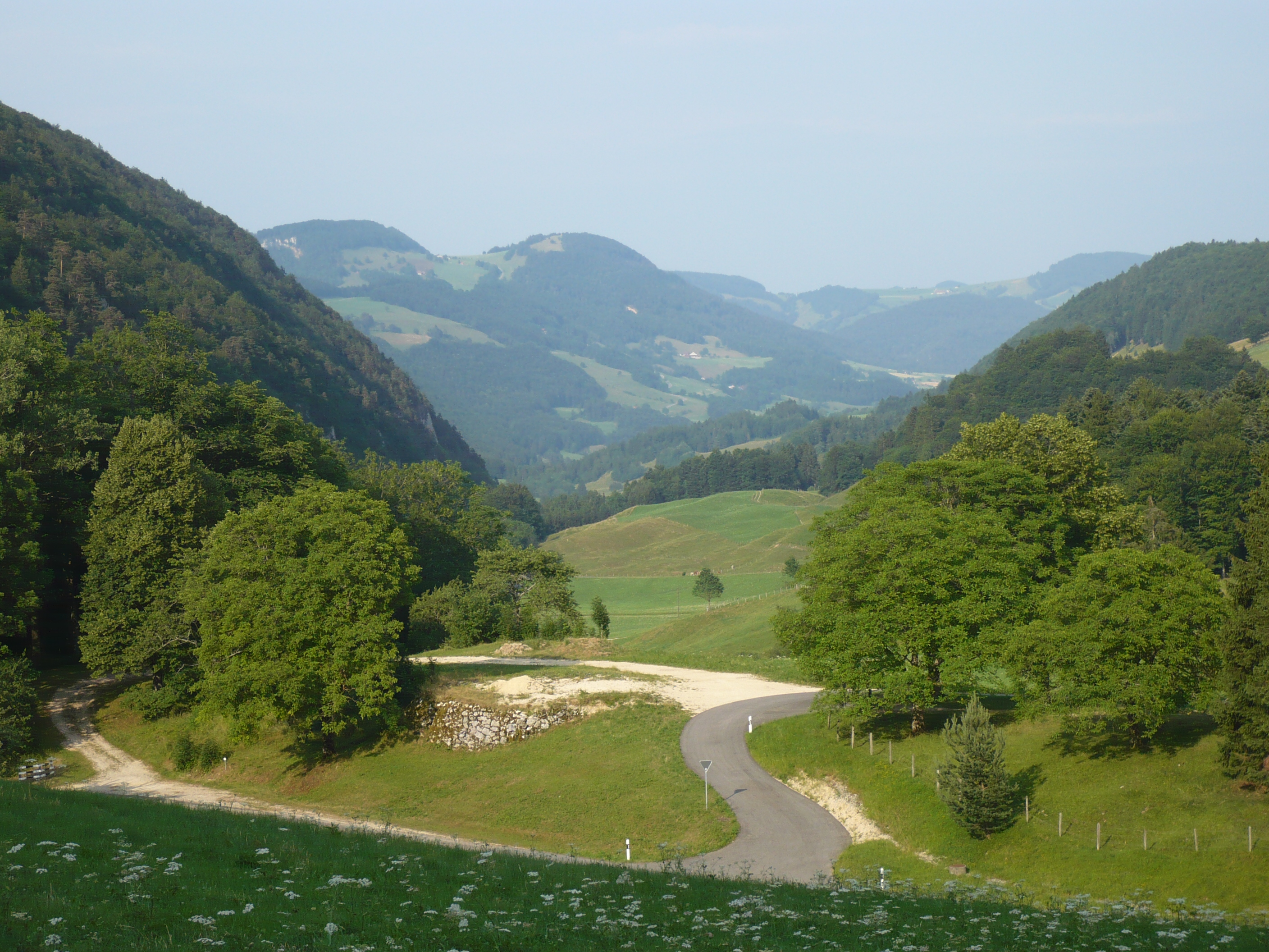 Guldental unterhalb des Scheltenpasses